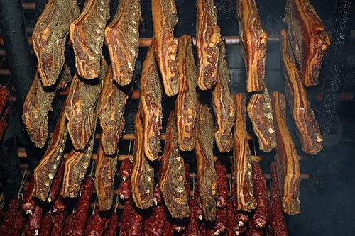 Freilichtmuseum Ballenberg